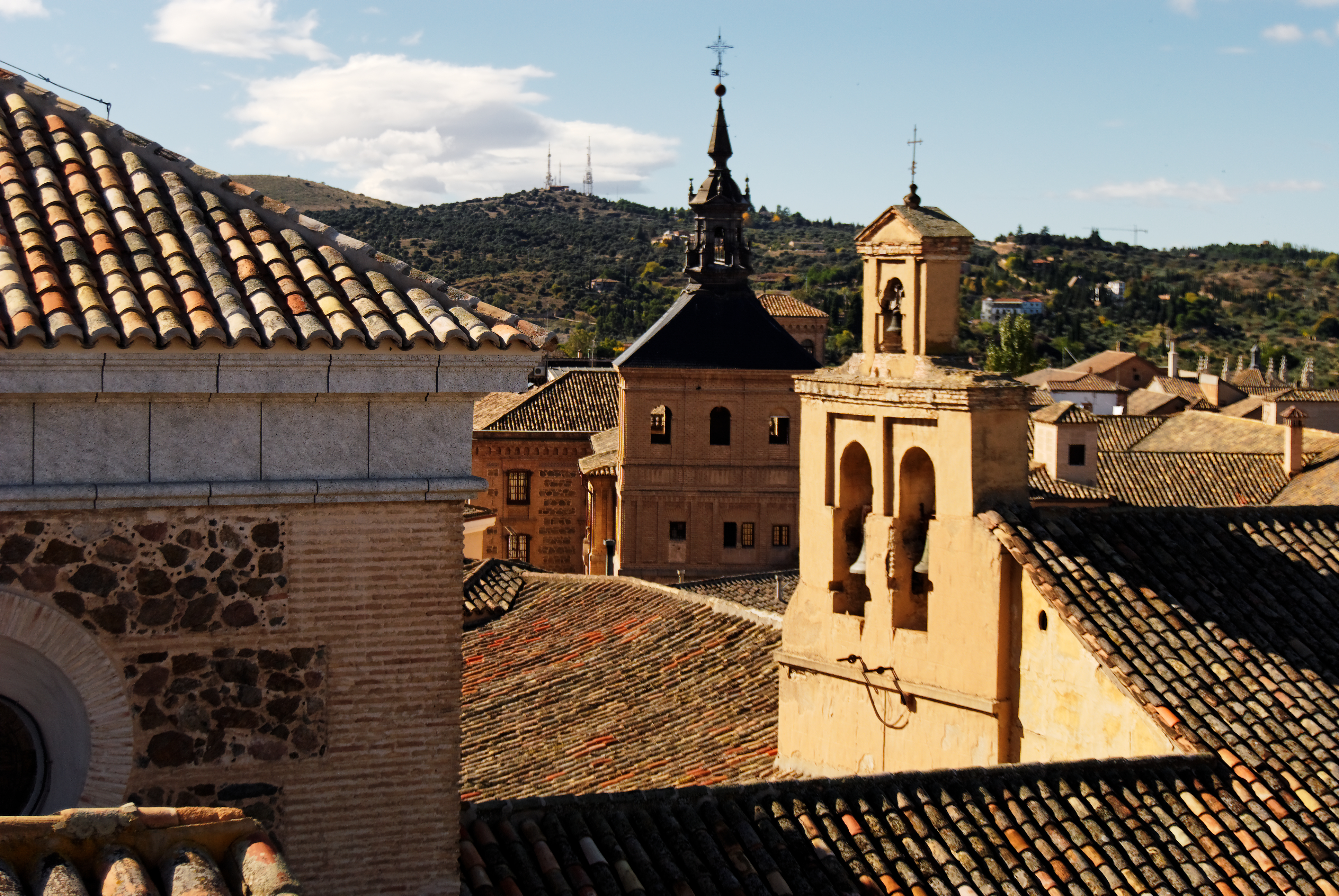 Torreón del Colegio de Doncellas y espadaña de Santo Domingo el Antiguo, vistos desde la torre de Santa Leocadia. Toledo, España.